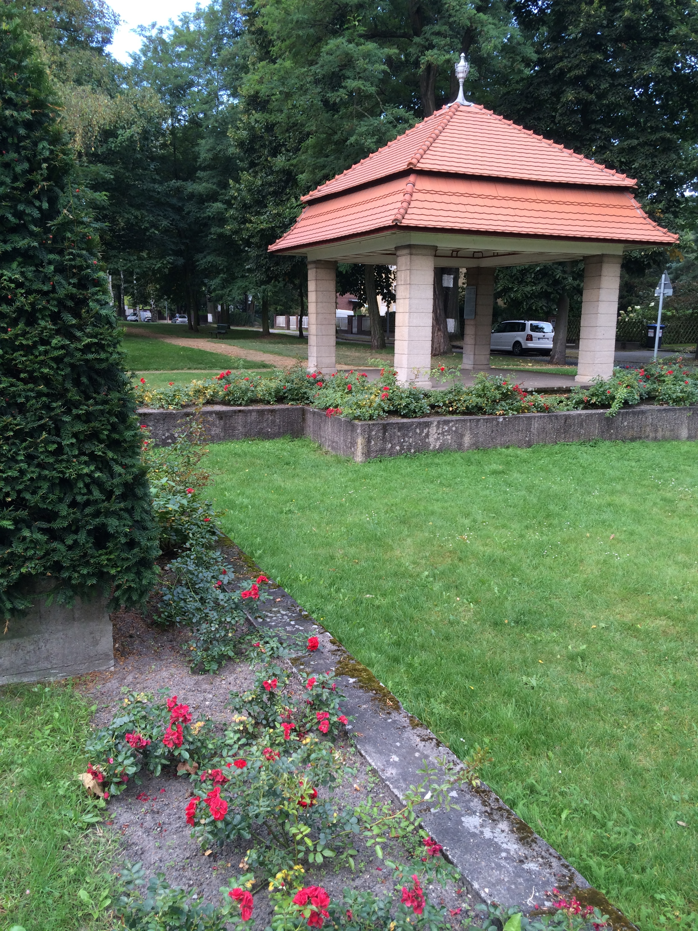 Berlin-Frohnau, Edelhofdamm, Park-Pavillon, 1909, Architekten: Gustav Hart und Alfred Lesser. Dies ist ein Foto des Berliner Kulturdenkmals mit der Nummer 09011901